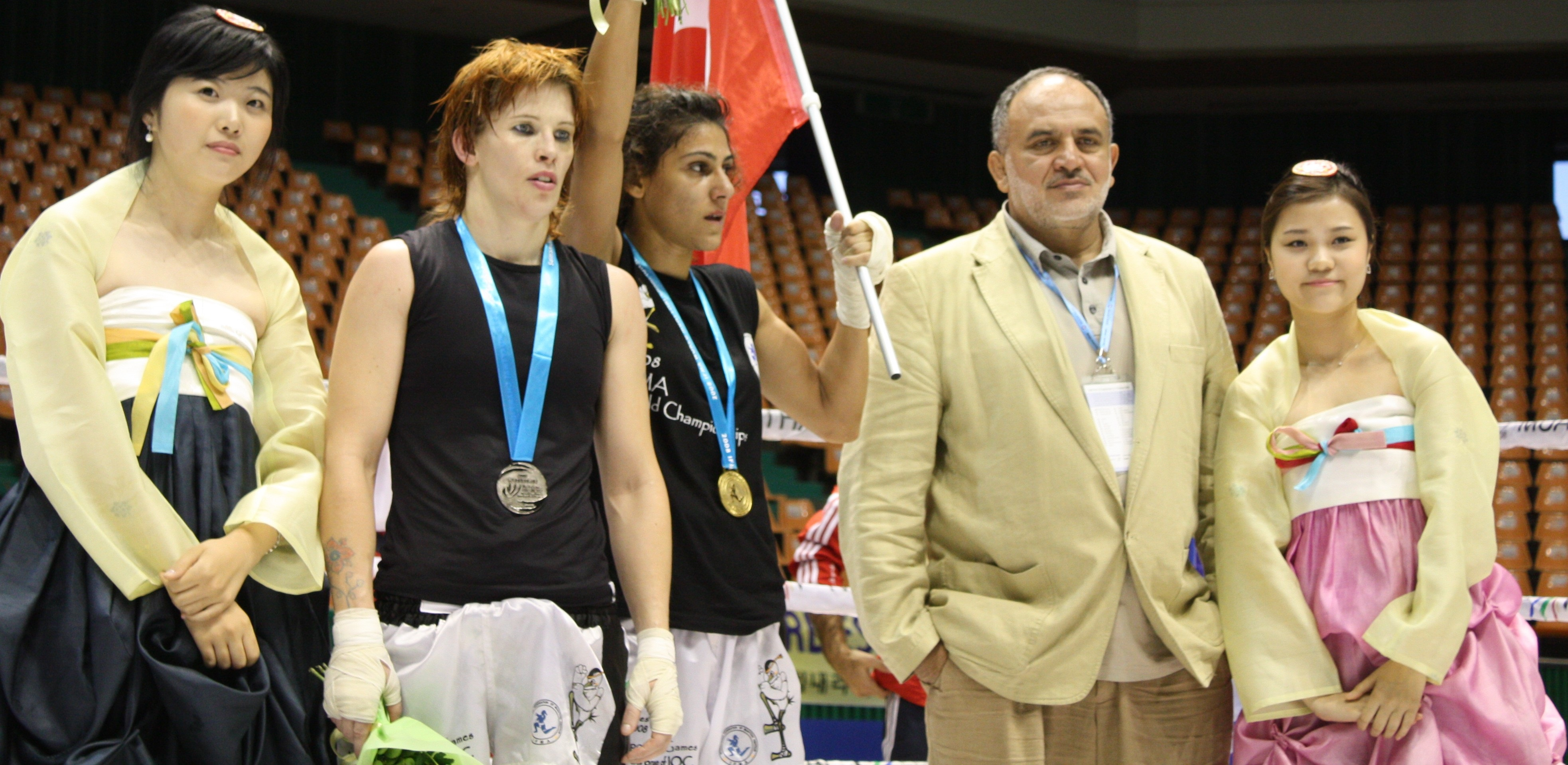 MM-hopea ei hymyilyttänyt tuoreeltaan Etelä-Korean Busanissa vuonna 2008.